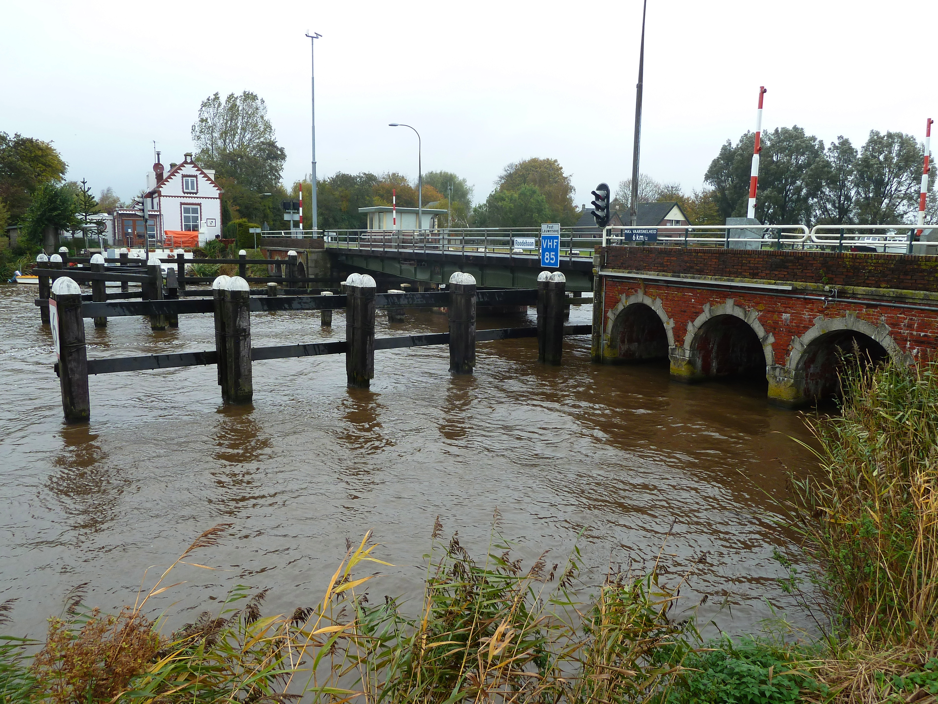 De draaibrug en het brugwachtershuisje bij Roodehaan.